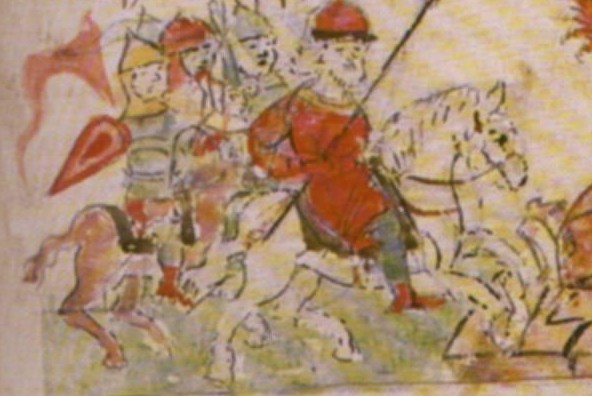 Владимир Святославич идёт на войну с вятичами. Радзивилловская летопись